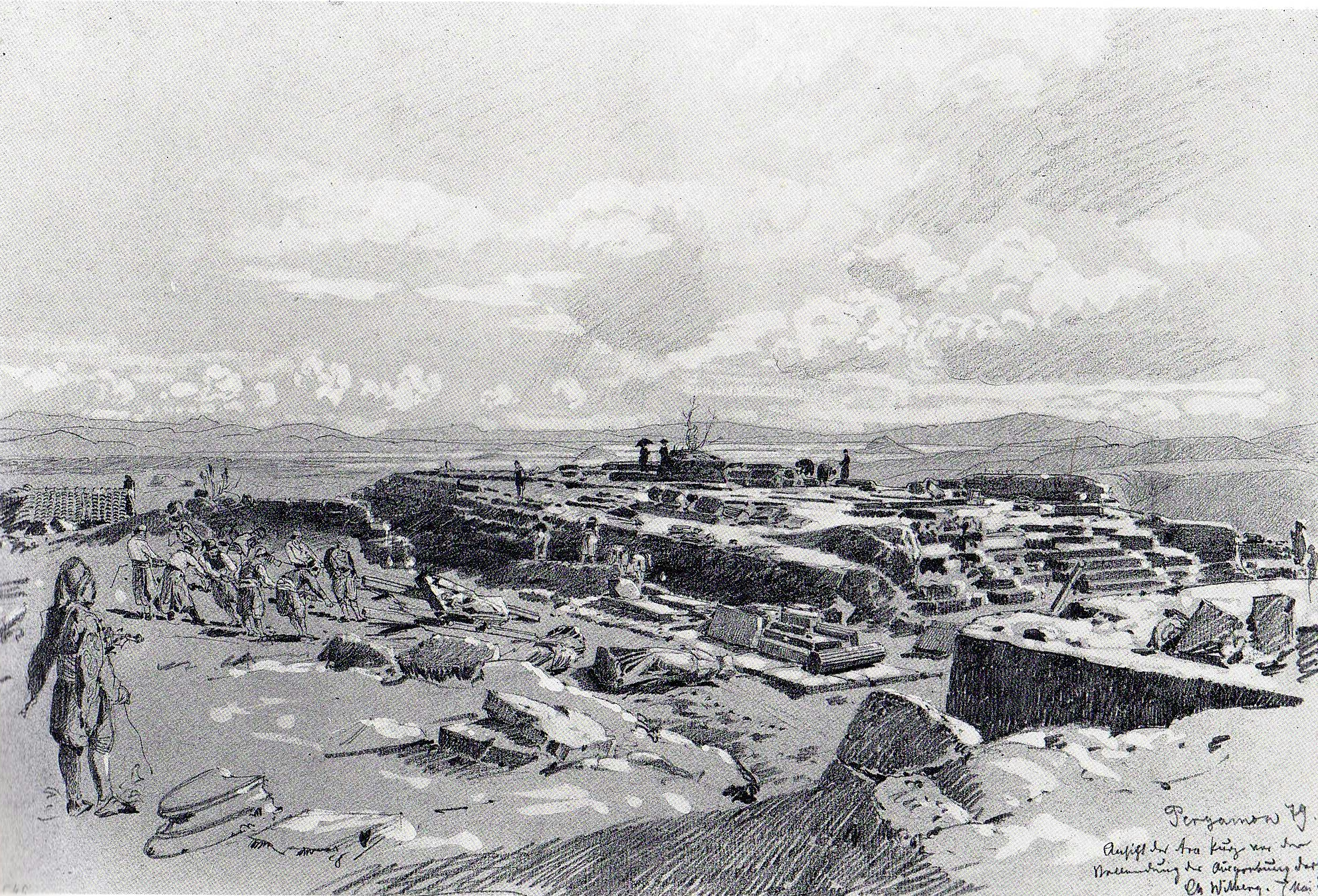 Christian Wilberg: Ausgrabungsplatz des Pergamonaltars; Bleistiftzeichung, weiß gehöht; 29,9x46,6cm; Beschriftung: "Ansicht der Ara kurz vor der Vollendung der Ausgrabung dort. Pergamon 79 (Mai)"; Staatliche Museen zu Berlin, Kupferstichkabinett, Sammlungen der Zeichnungen und Druckgrafiken